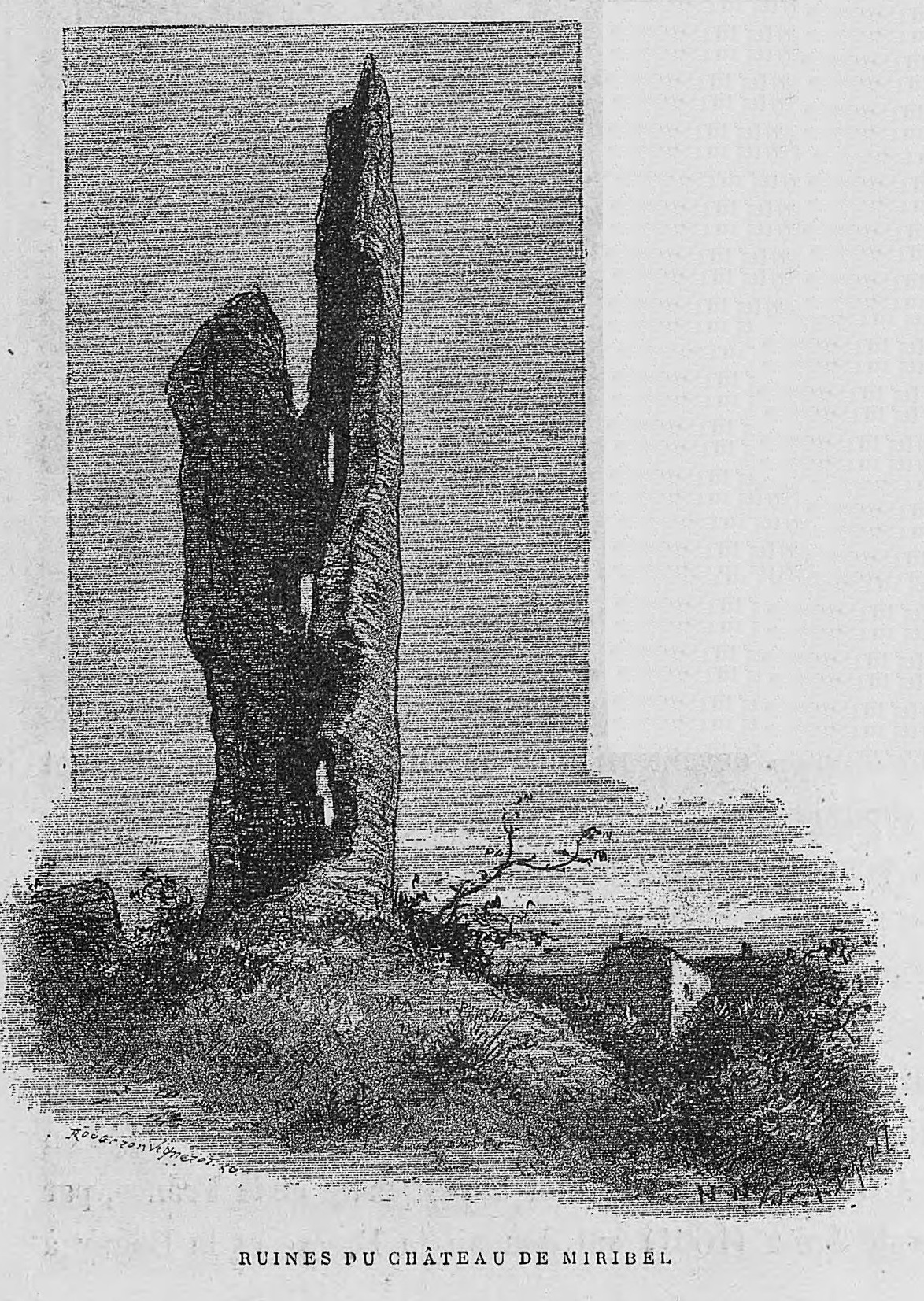 Aux environs de Lyon / Monsieur Josse ; préface de M. Coste-Labaume ; édition illustrée de 250 dessins de J. Drevet.